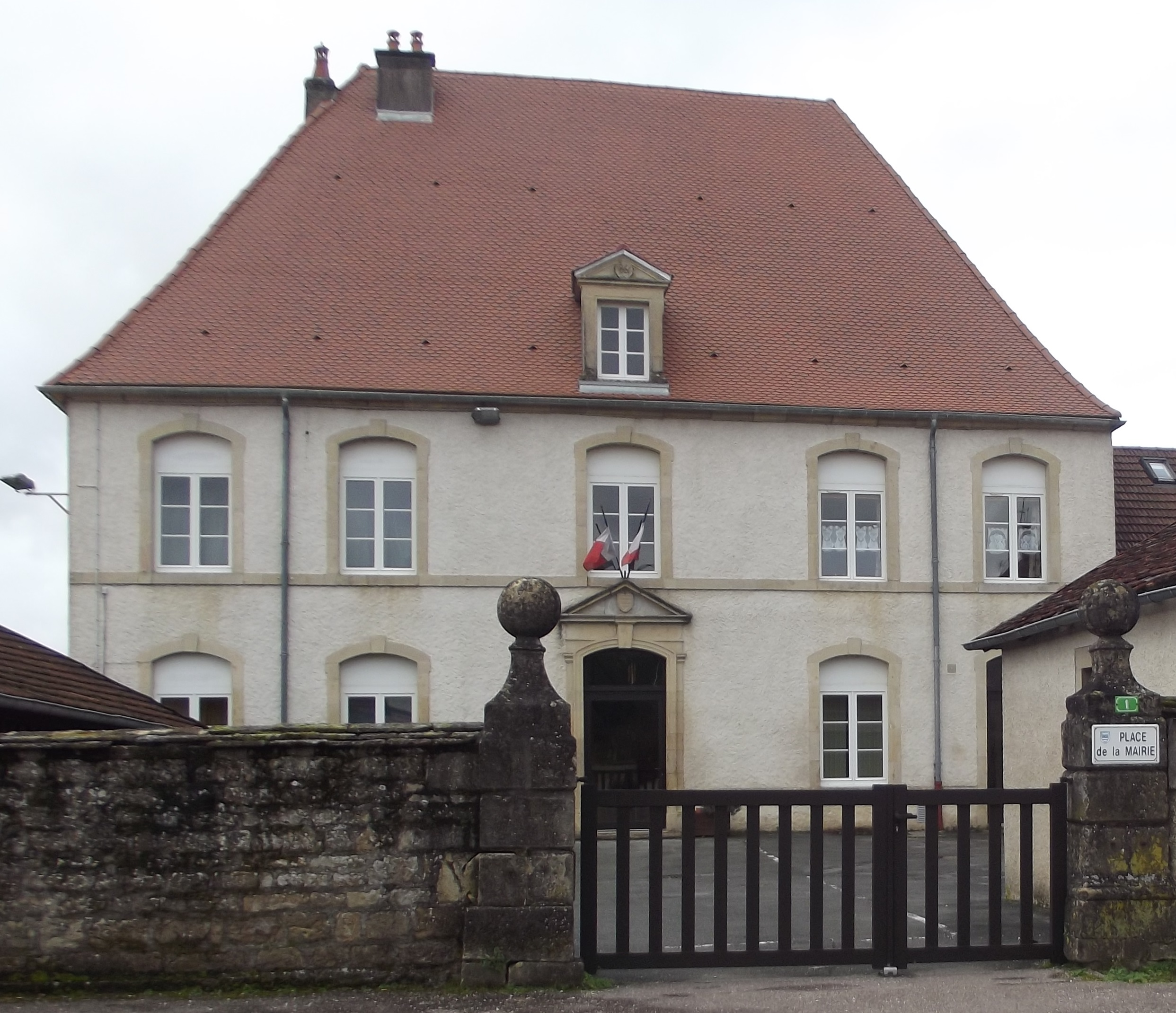 Mairie de Provenchère